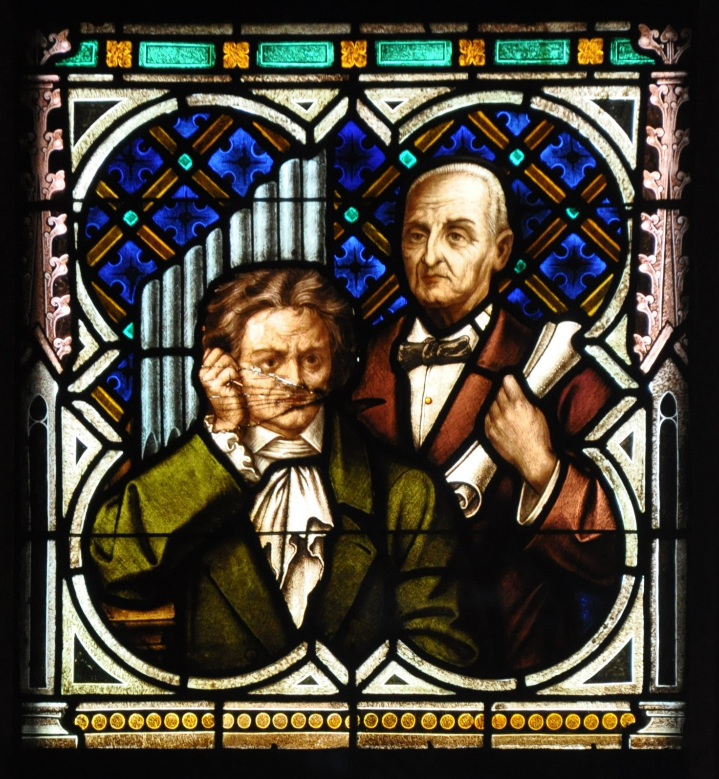 Linz, Neuer Dom, Glasfenster "Linz" (Böhm-Führer Nr. 12), Detail: Bruckner und Beethoven